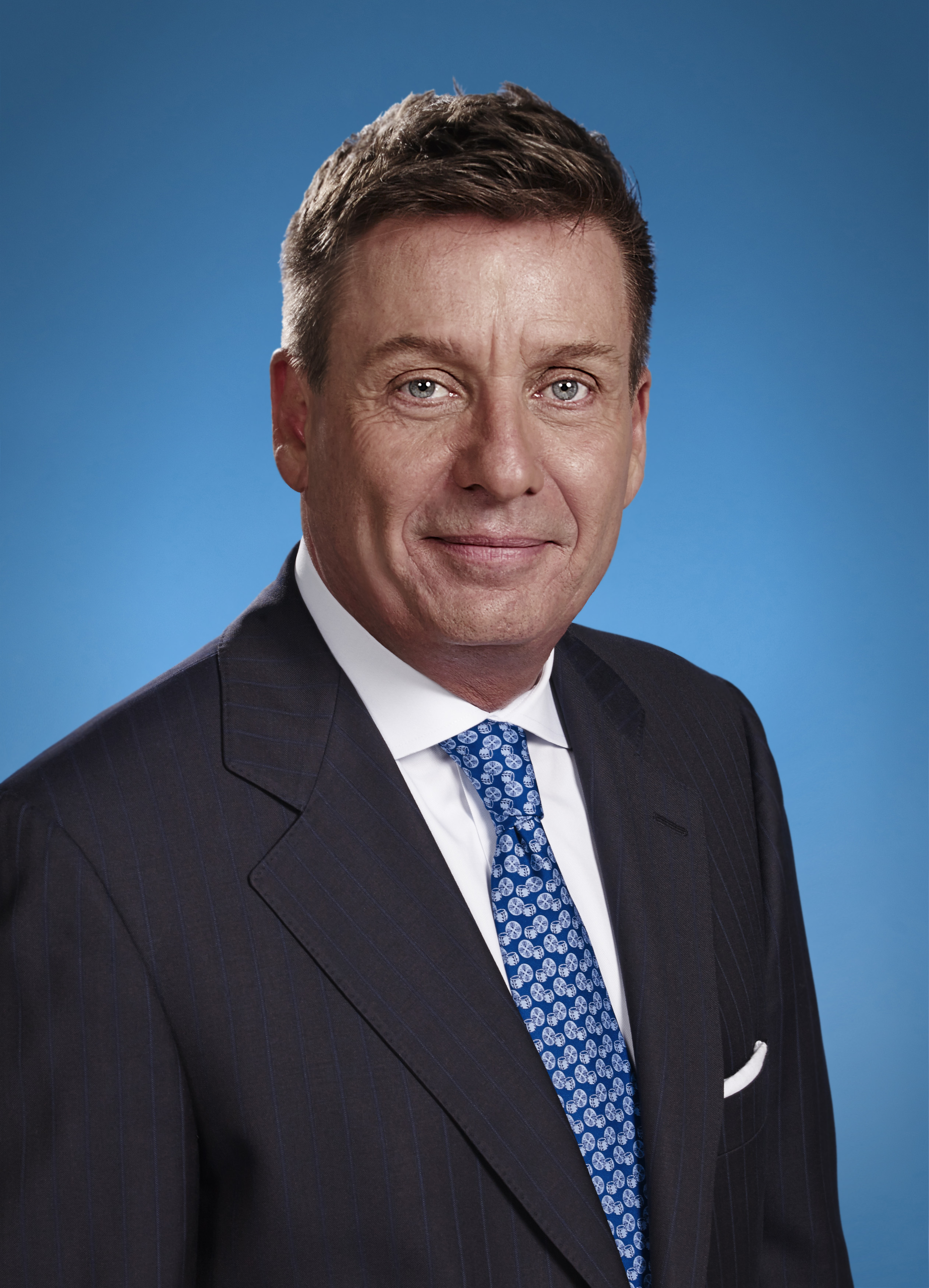 Photo officielle numéro 2